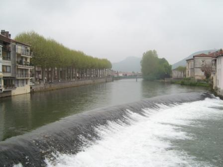 Le Salat à Saint-Girons (Ariège, Midi-Pyrénées, France).